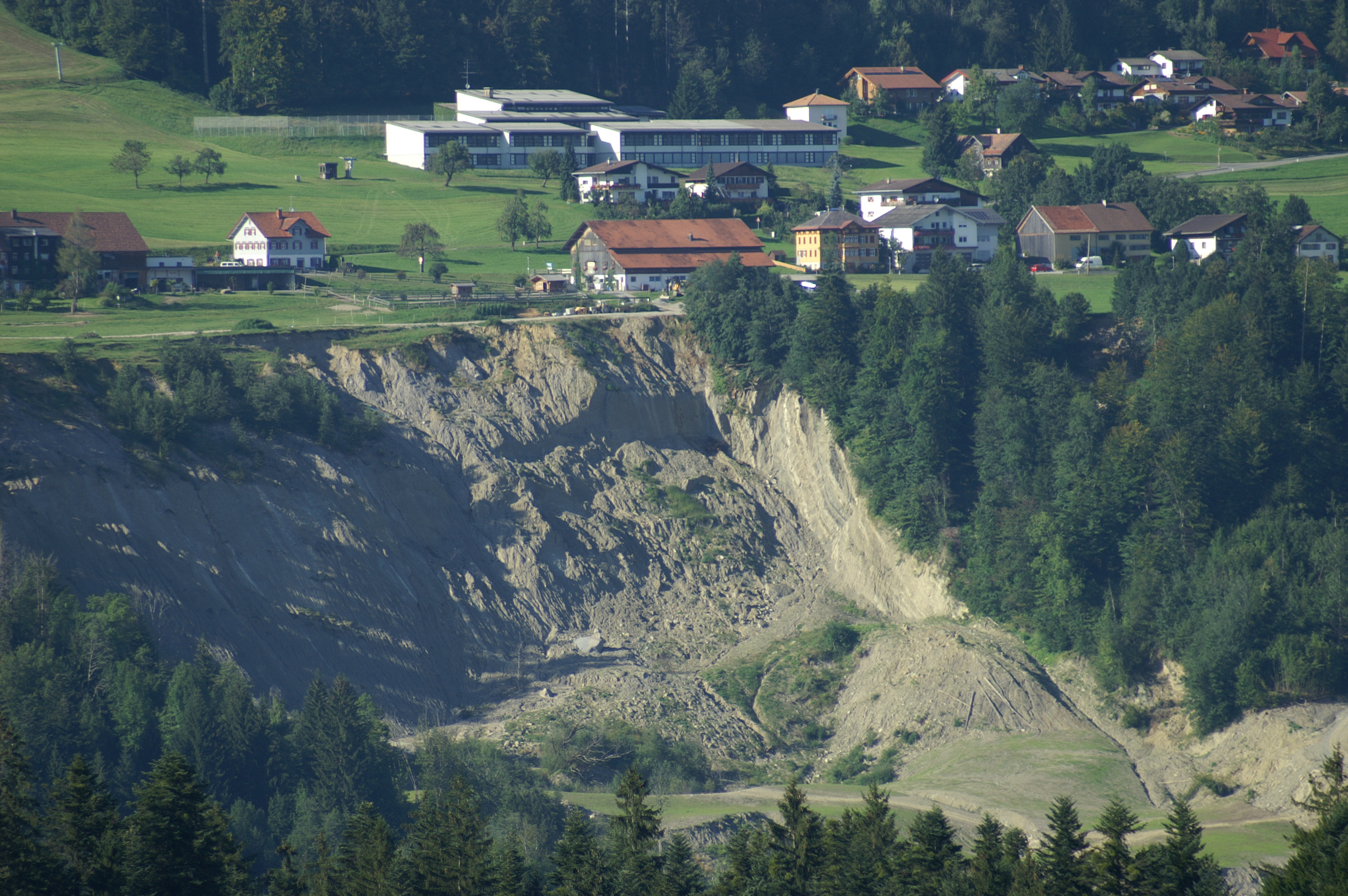 Insgesamt sind am 25. Februar 2007 auf rund 800 Metern Länge und 380 Metern Breite auf gut 200.000 Quadratmetern Gestein in Bewegung geraten. Die größte Verschiebung gab es am Donnerstag, da rutschte der Hang innerhalb von 24 Stunden nahezu 17 Meter ab. [1] Im Zentrum der Gemeinde Doren im Bregenzerwald “Blick von Englen der Gemeinde Langenegg”. Im Bildhintergrund die Volks-und Hauptschule Doren